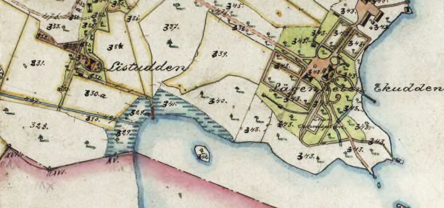 Torpen Listudden och Ekudden som låg under Skarpnäck